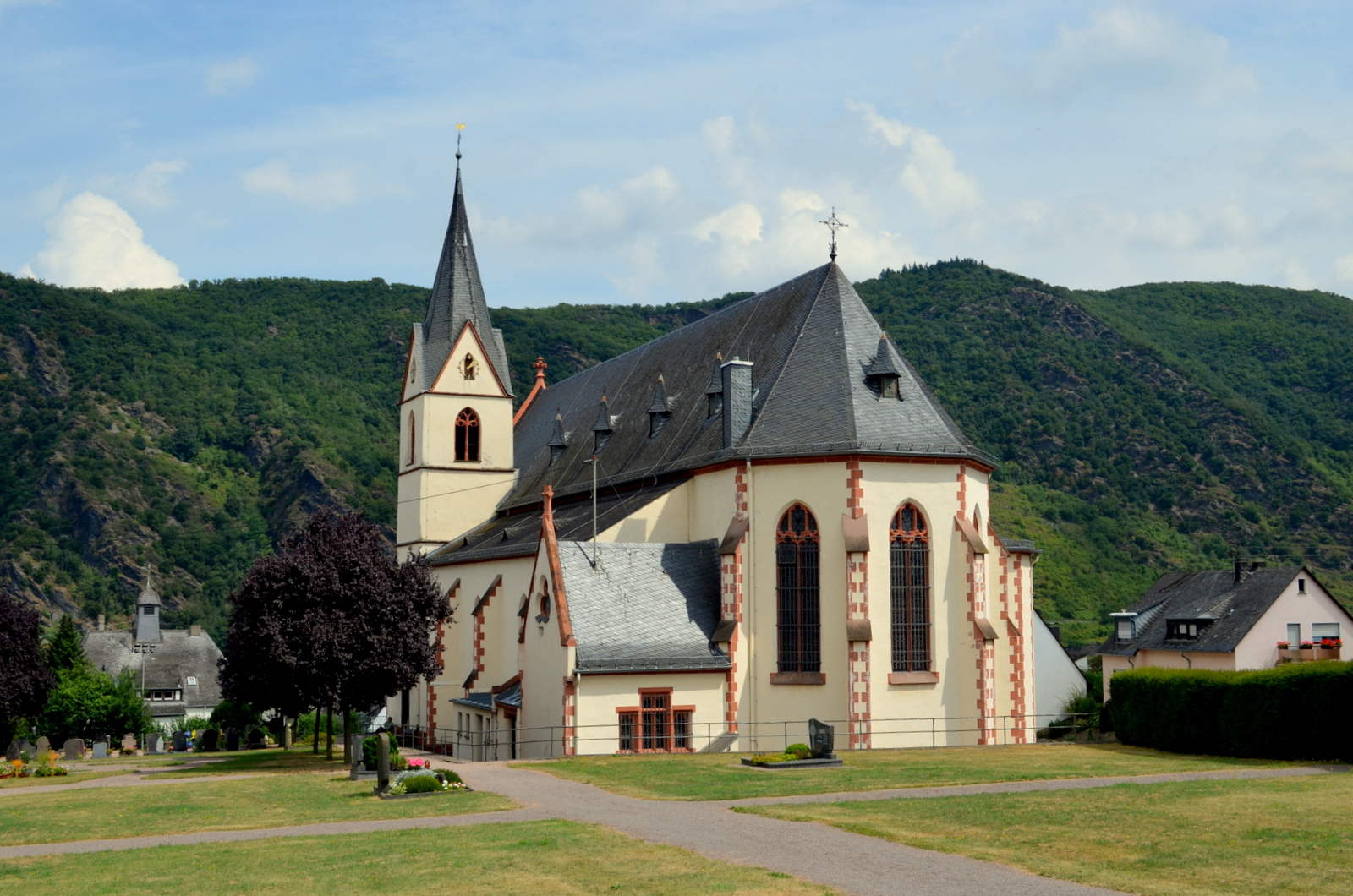 Bad Salzig, Sint-Egidiuskerk